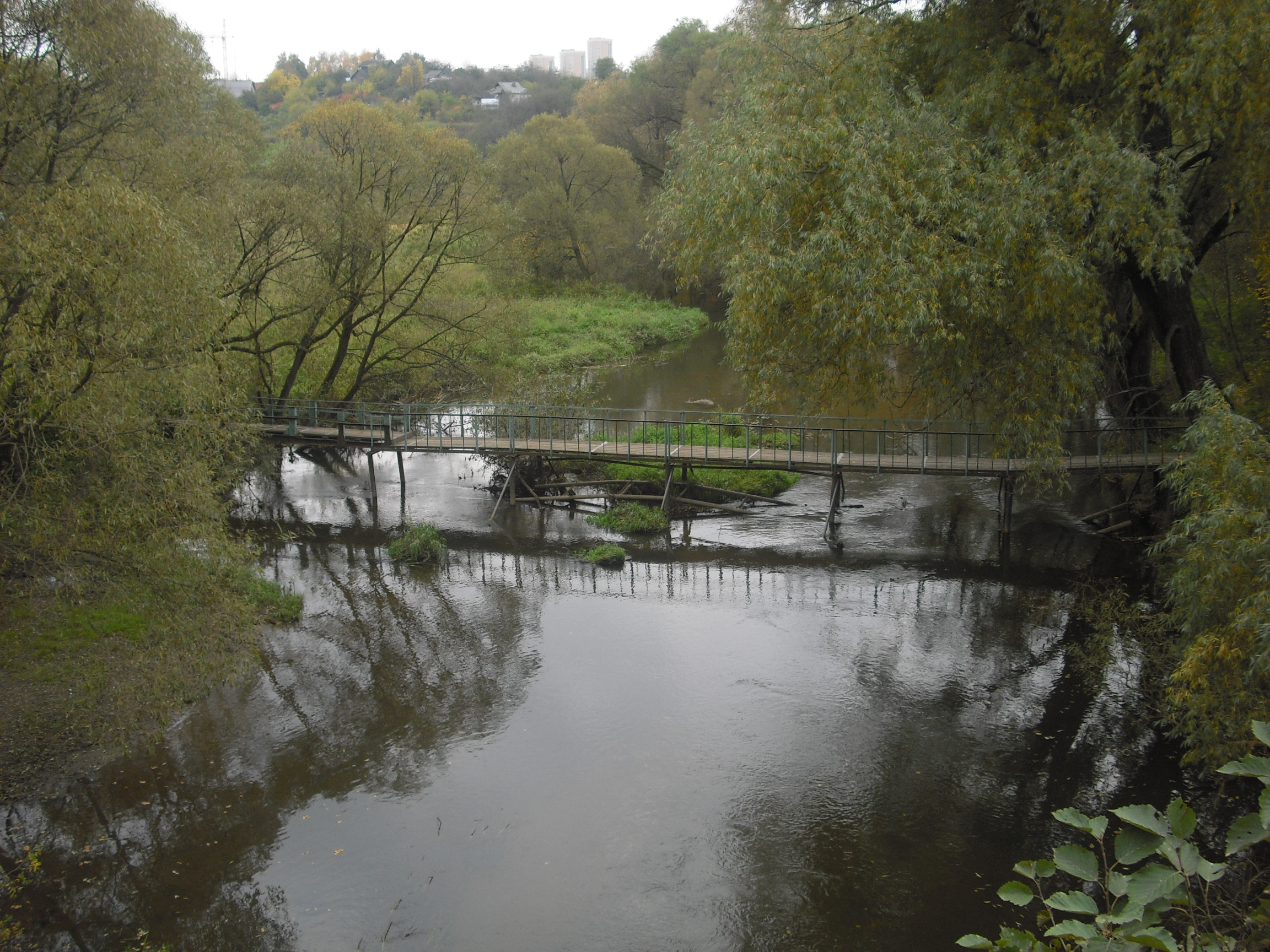 Вид на реку Сходню с моста около д. Путилково